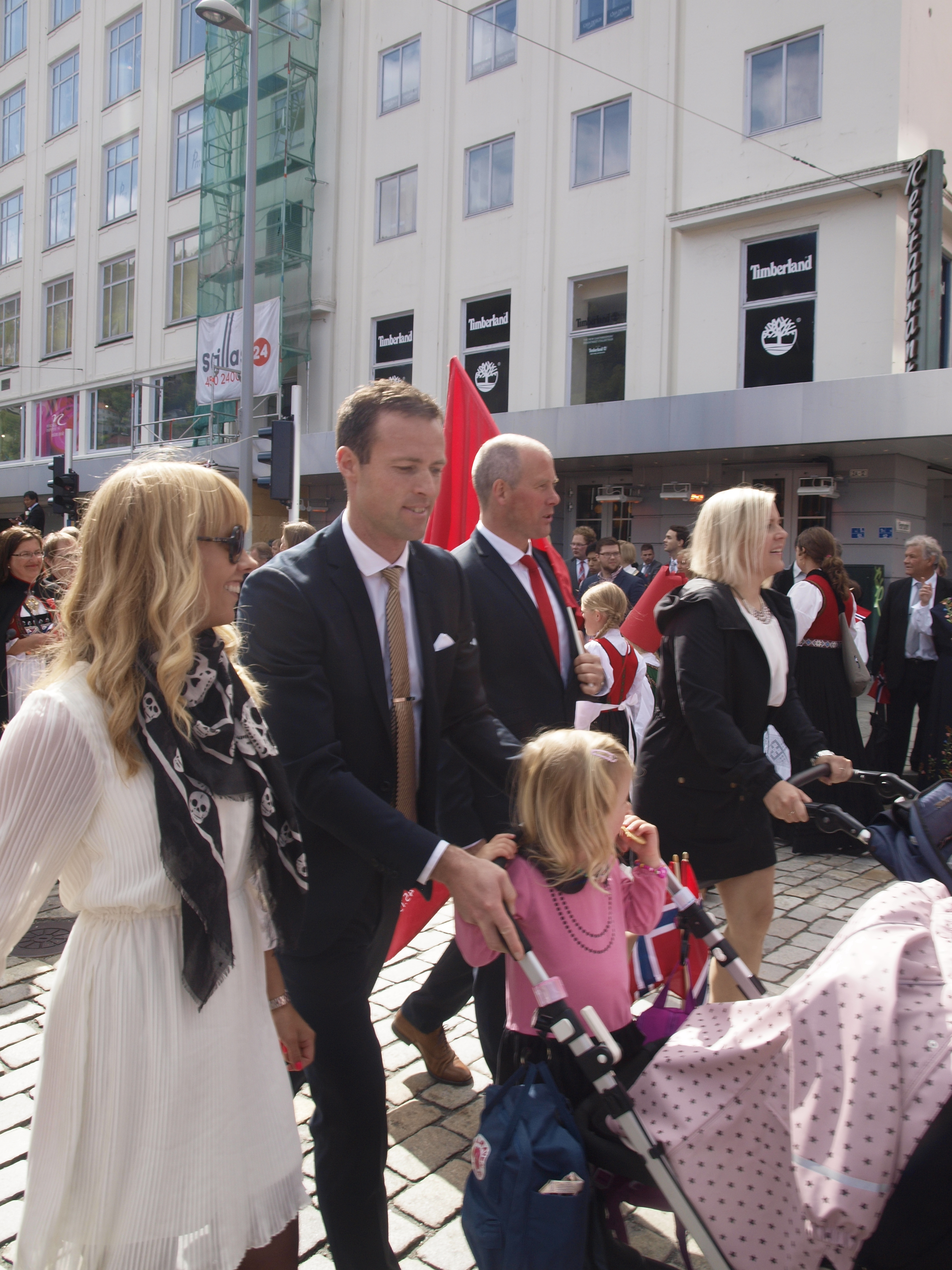 Markus Jonsson in 2014